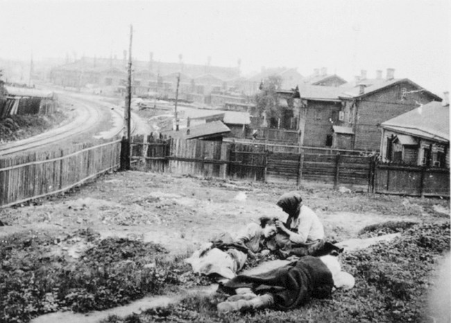 Жертви голоду. Харківщина, 1933 р. Фото з Колекції Кардинала Теодора Інніцира (Архів Віденської дієцезії). Фото зробив інж. А. Вінербергер. Фотодокументи надані проф. Василем Марочком (Інститут історії України НАН України).